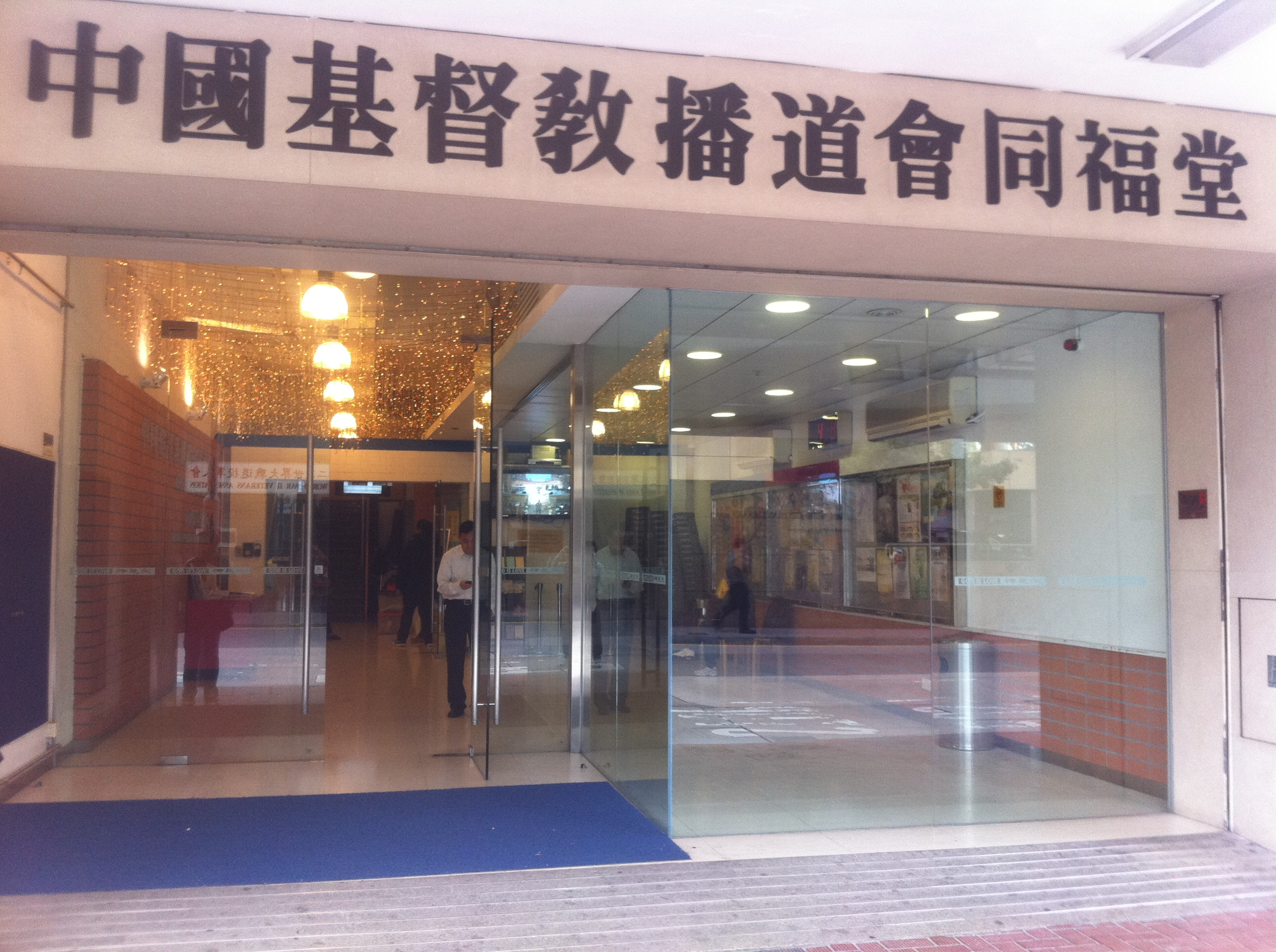 中文（香港）: 銅鑼灣 摩頓臺 中華基督教播道會同福堂